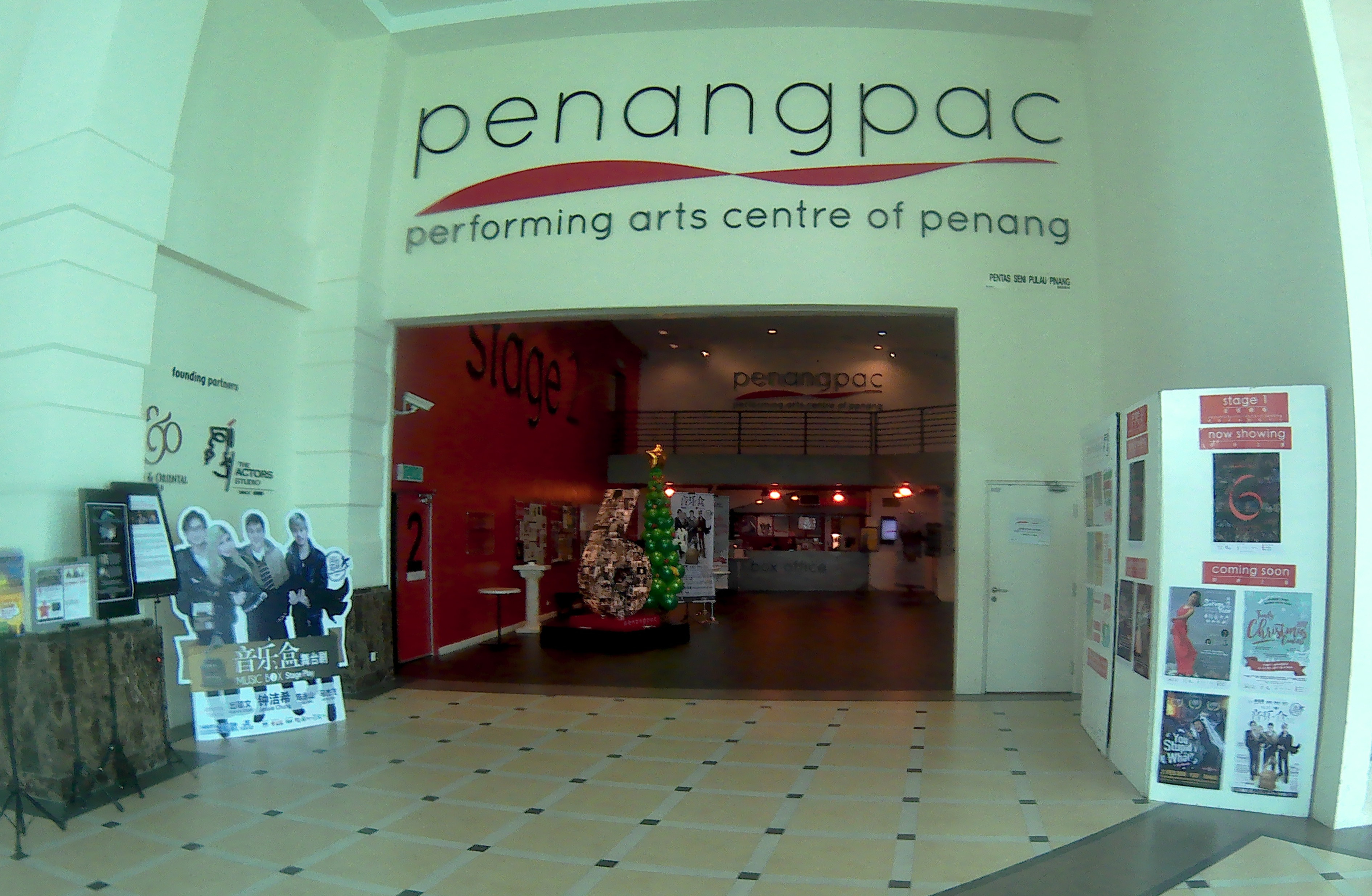 海峡岸广场内的槟城表演艺术中心